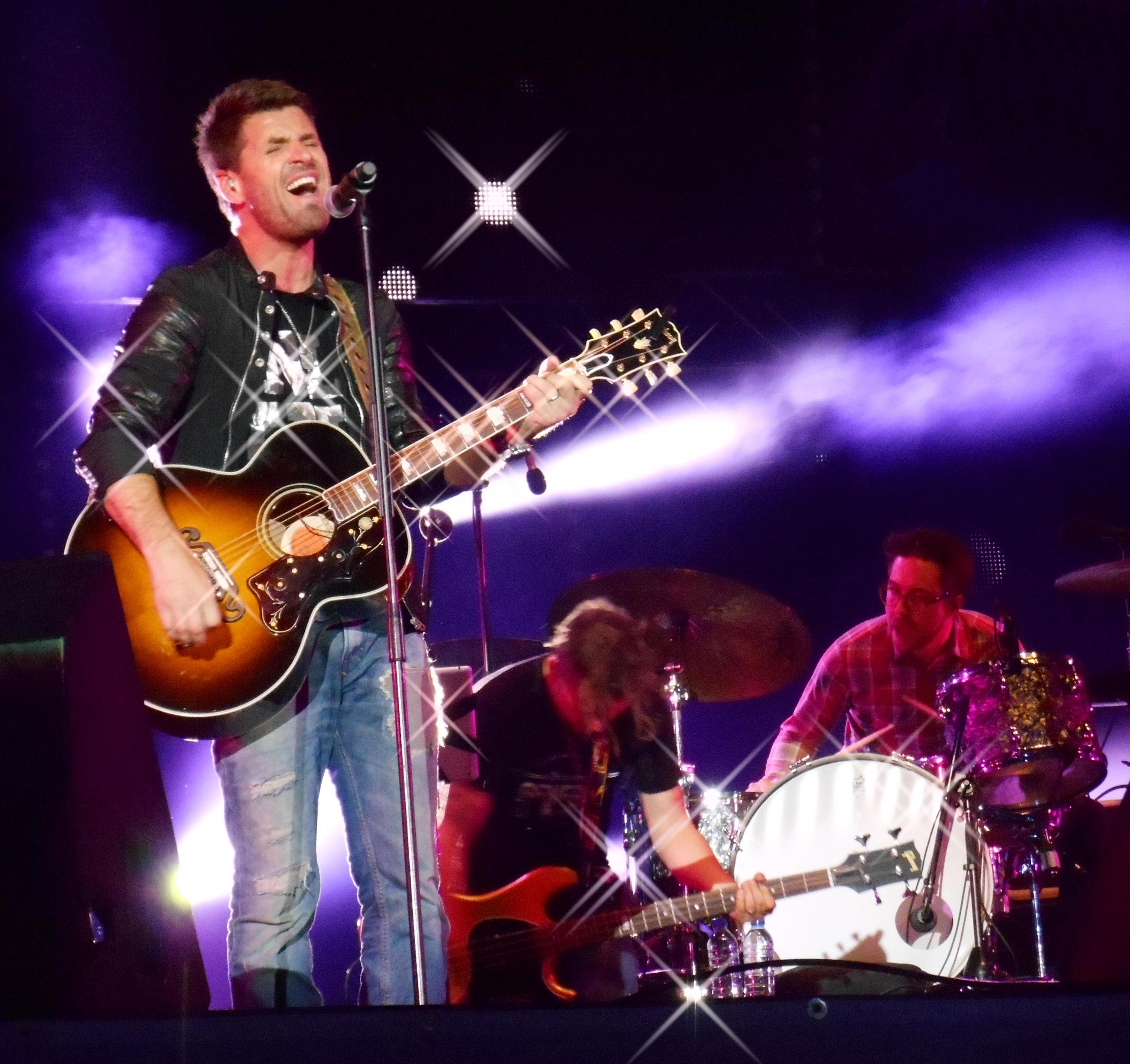 Marc Dupré a offert une performance aux FrancoFolies de Montréal, le 14 juin 2014, à la place des Festivals. (image modifiée avec effet d'étoiles)